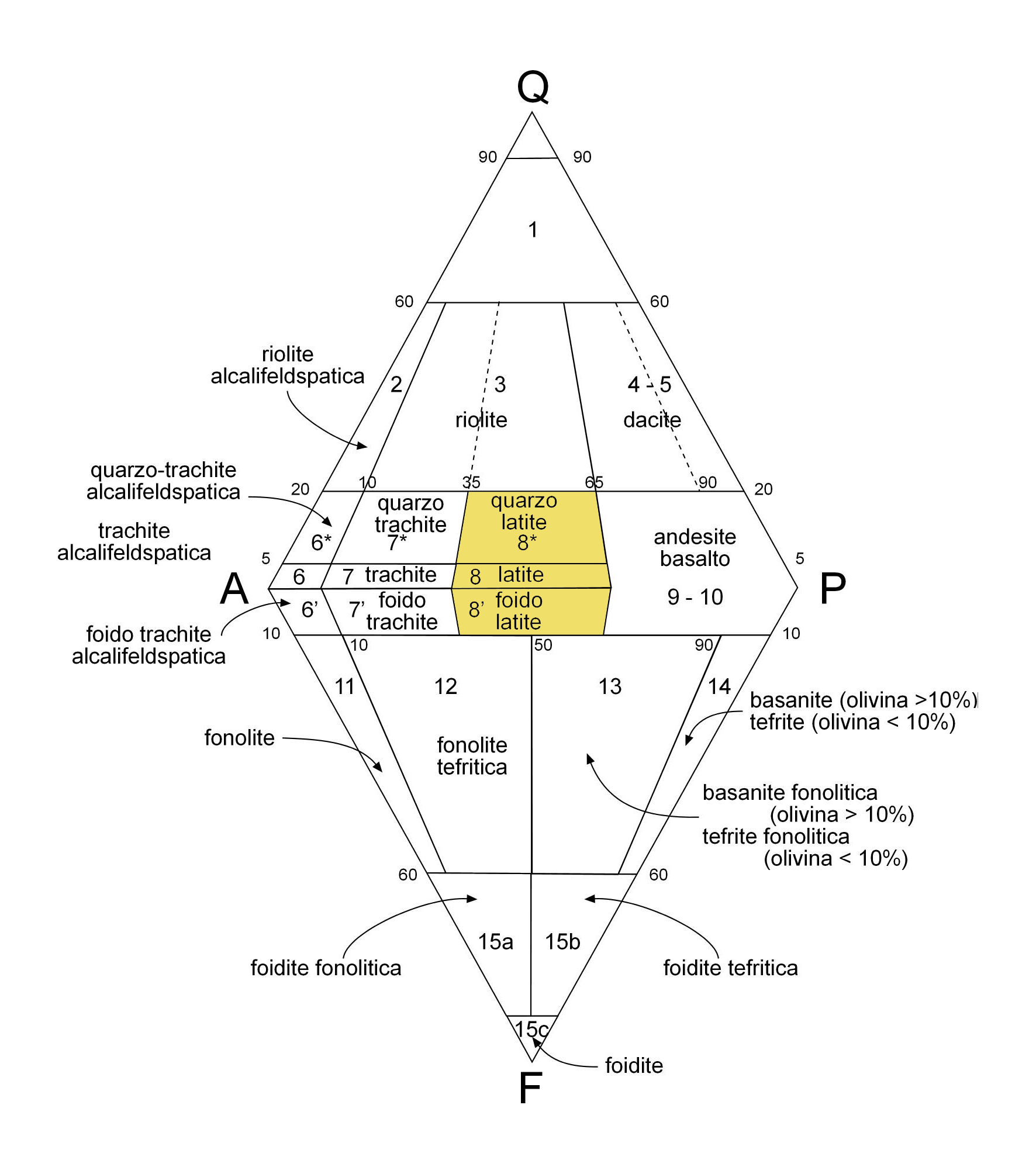 Posizione delle latiti nel doppio triangolo QAPF